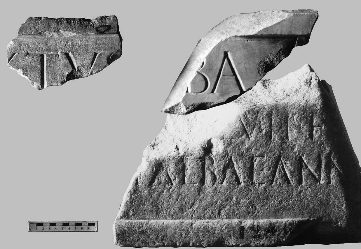 Уламок напису з бази скульптури Альба Сільвія на Форумі Августа